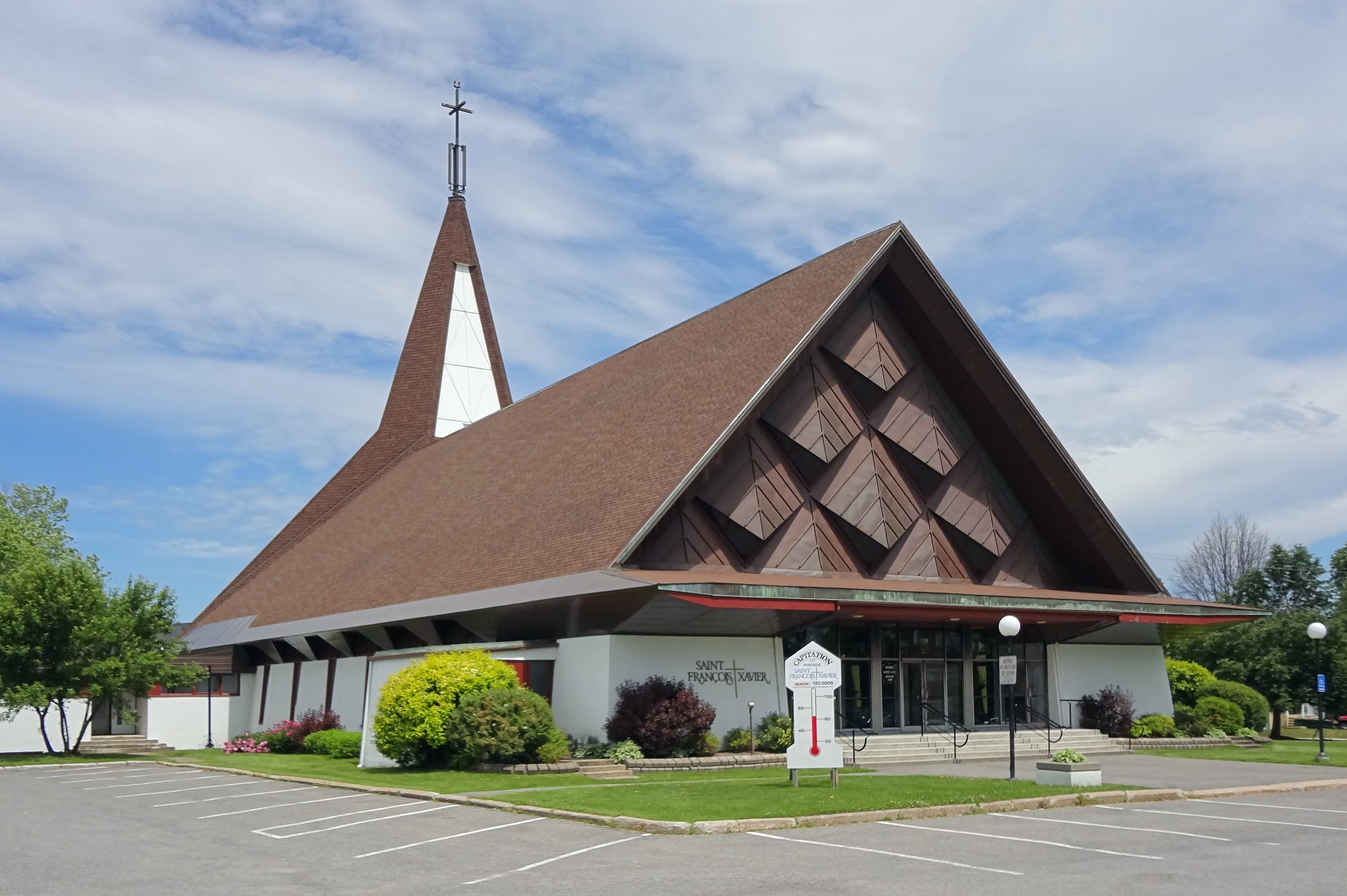 Église Saint François Xavier, dans le secteur Duberger, ville de Québec. Construite en 1969.